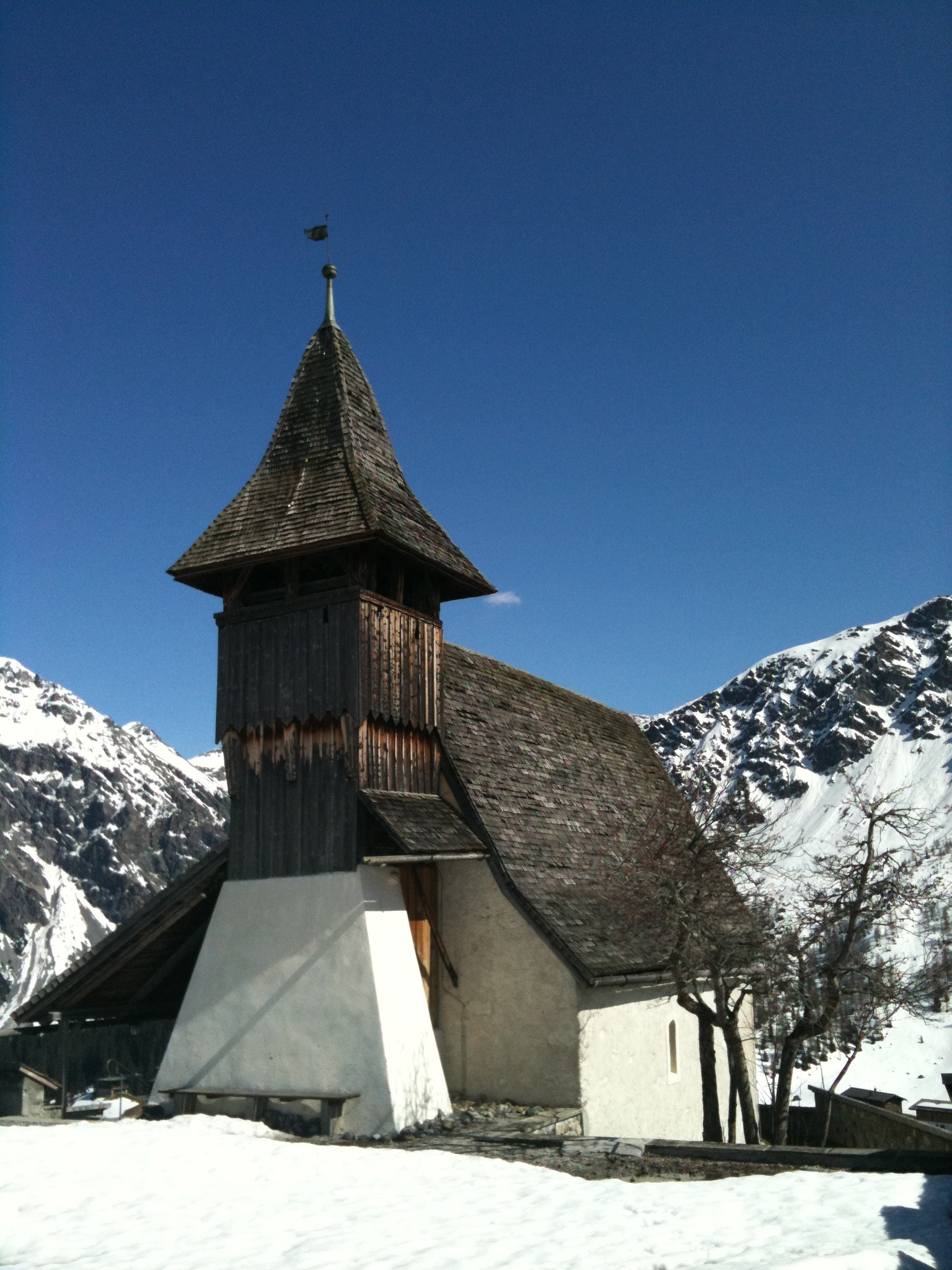 Bergkirchli Arosa, Kanton Graubünden